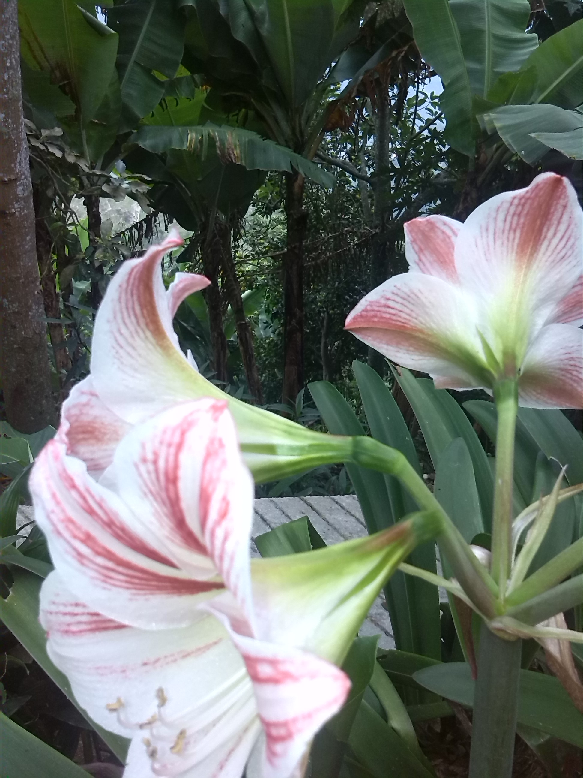 naturaleza